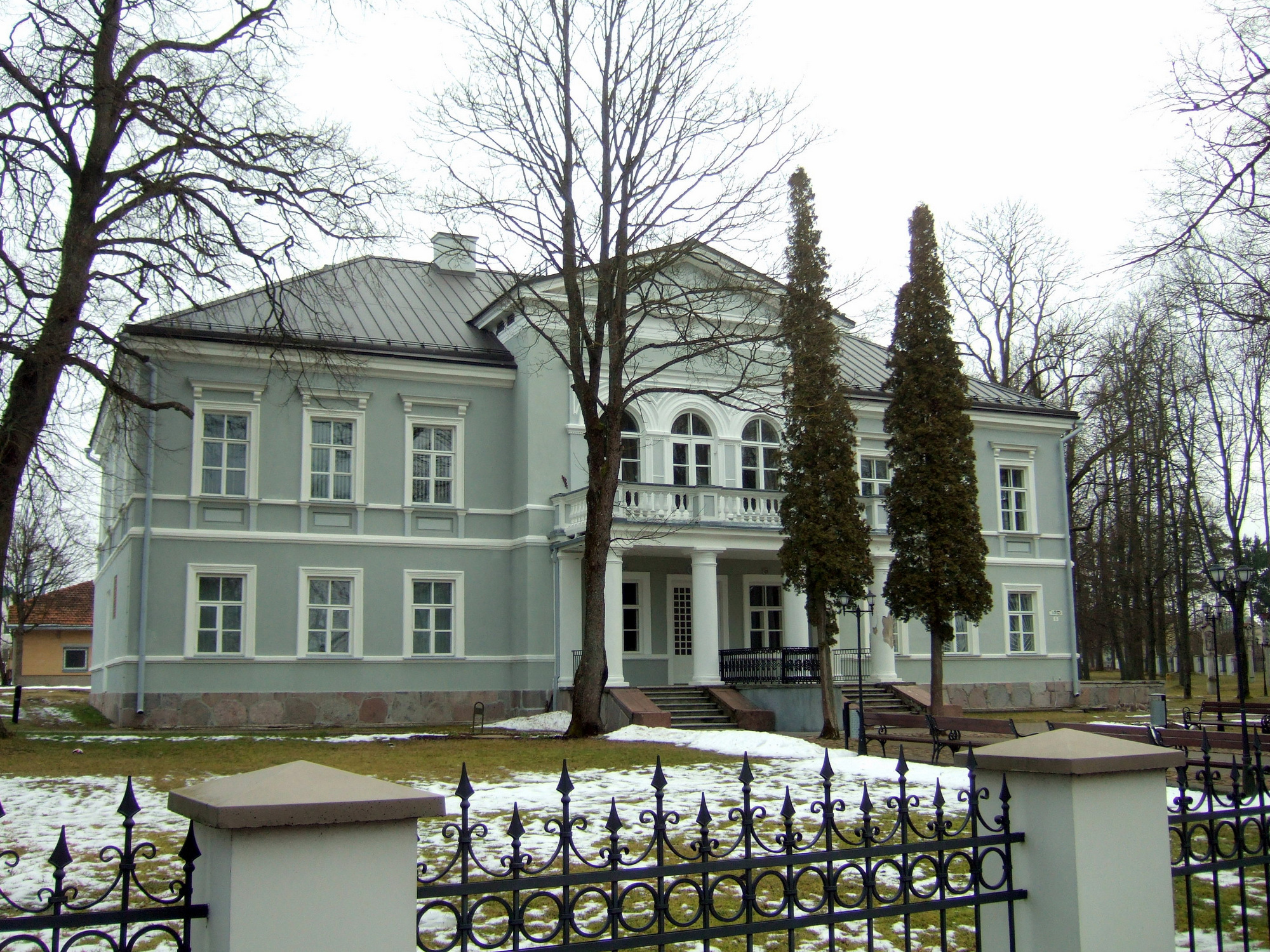 Šalčininkų dvaro rūmai